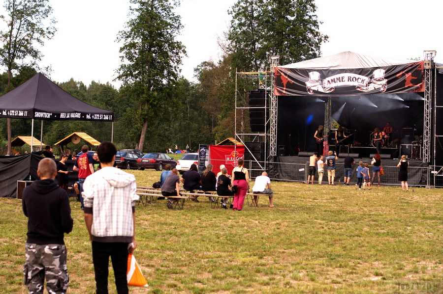 Muusikafestivali Amme Rock 2014 lava, festivaliplats ja külastajad. Esinema hakkab Wrath Mocha.